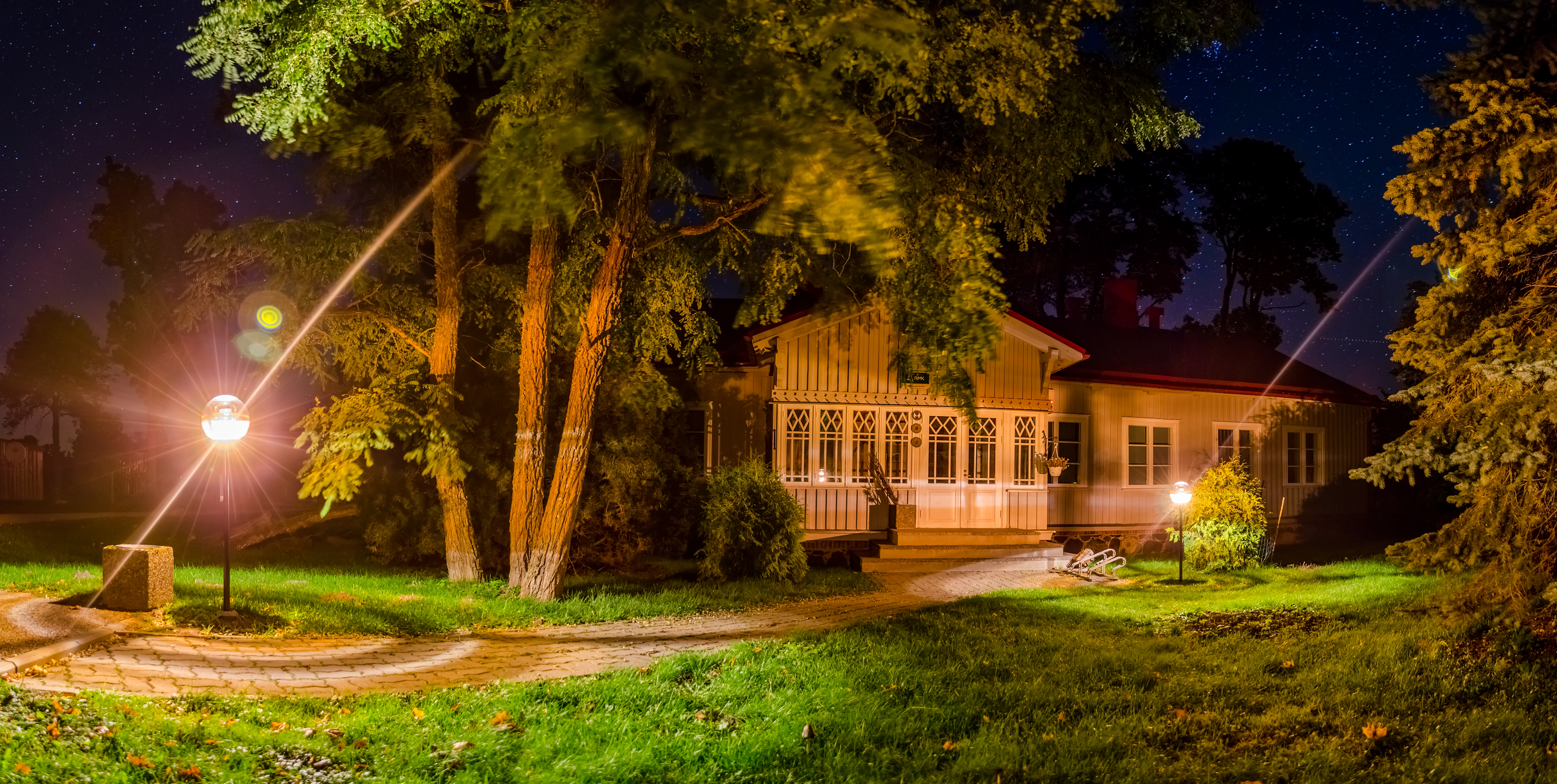 Varbla looduskeskus